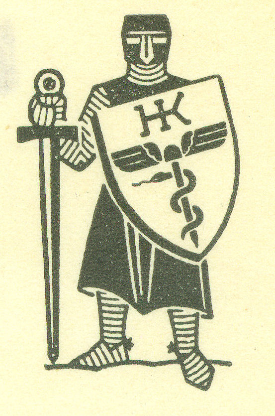 Briefkopf vom Mai 1935